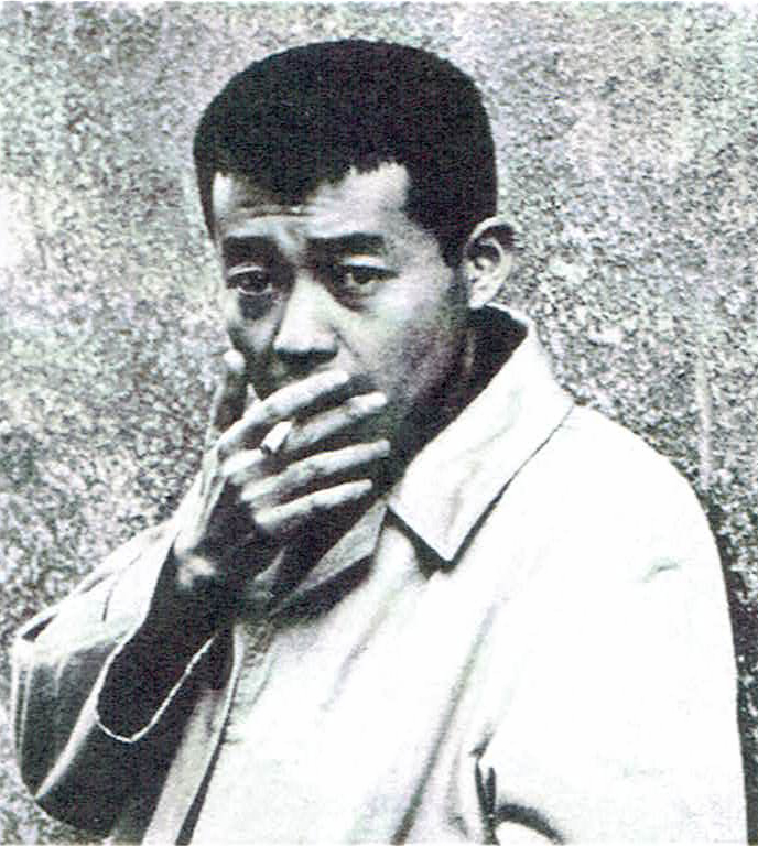 誠文堂新光社『アイデア=Idea』第13巻第75号（1966）より和田誠